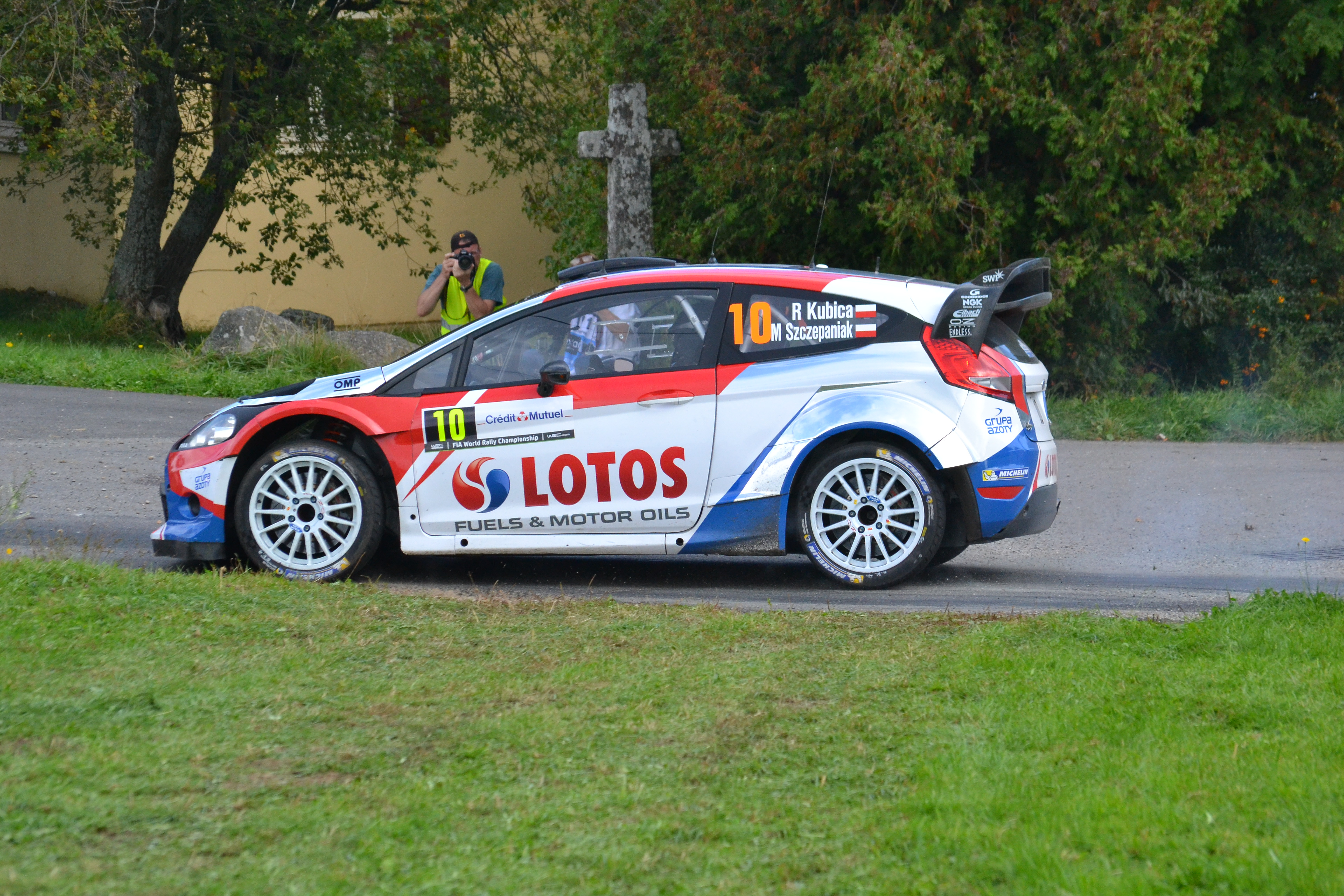 Rallye WRC France-Alsace 2014, ES12 Soultzeren - Le Grand Hohnack 2 à Labaroche. Ford Fiesta RS WRC - Robert Kubica - Maciek Szczepaniak